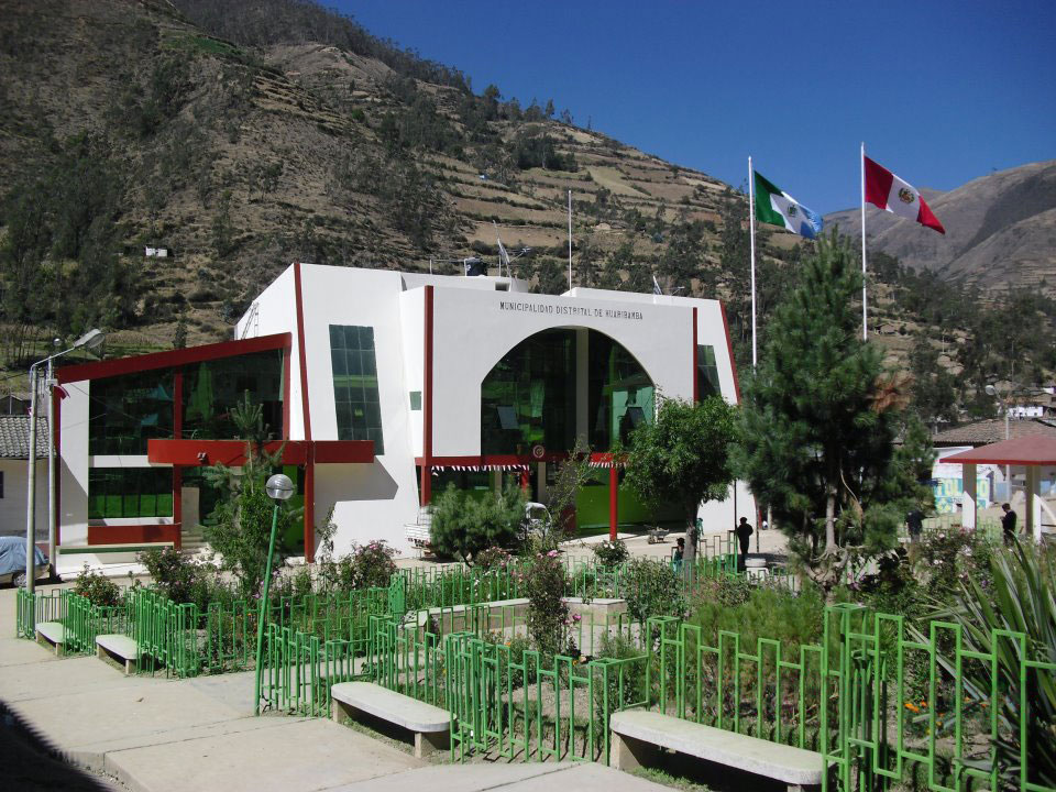 huaribamba